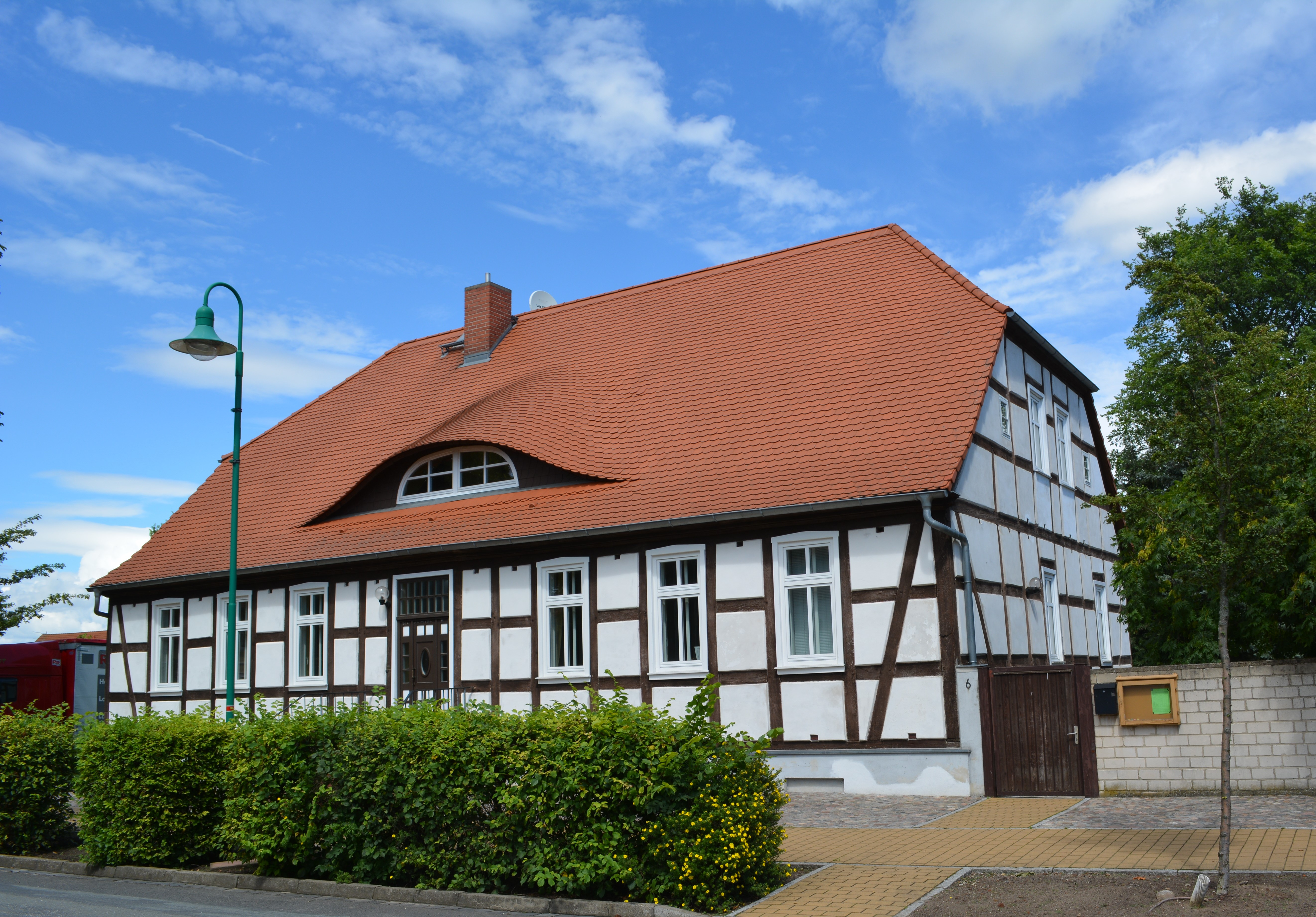 Fachwerkwohnhaus in der Altstadt von Rhinow, Landkreis Havelland